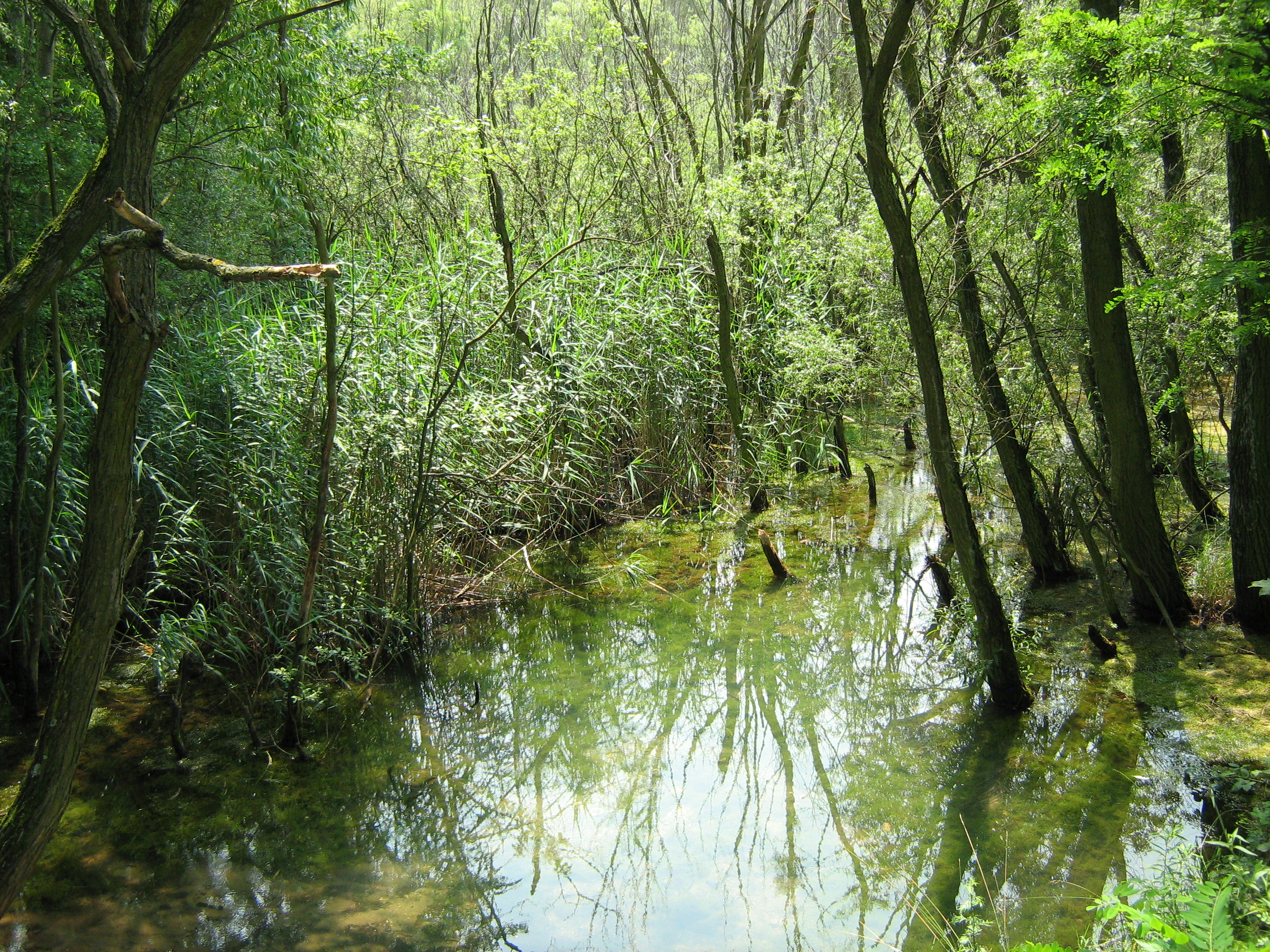 Galla-patak, felső szakasz (Tatabánya-Felsőgalla)